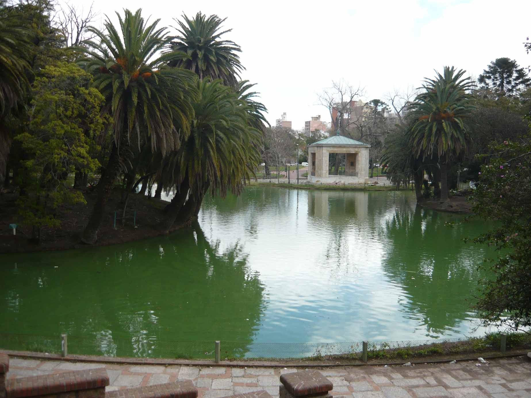 Vista lago